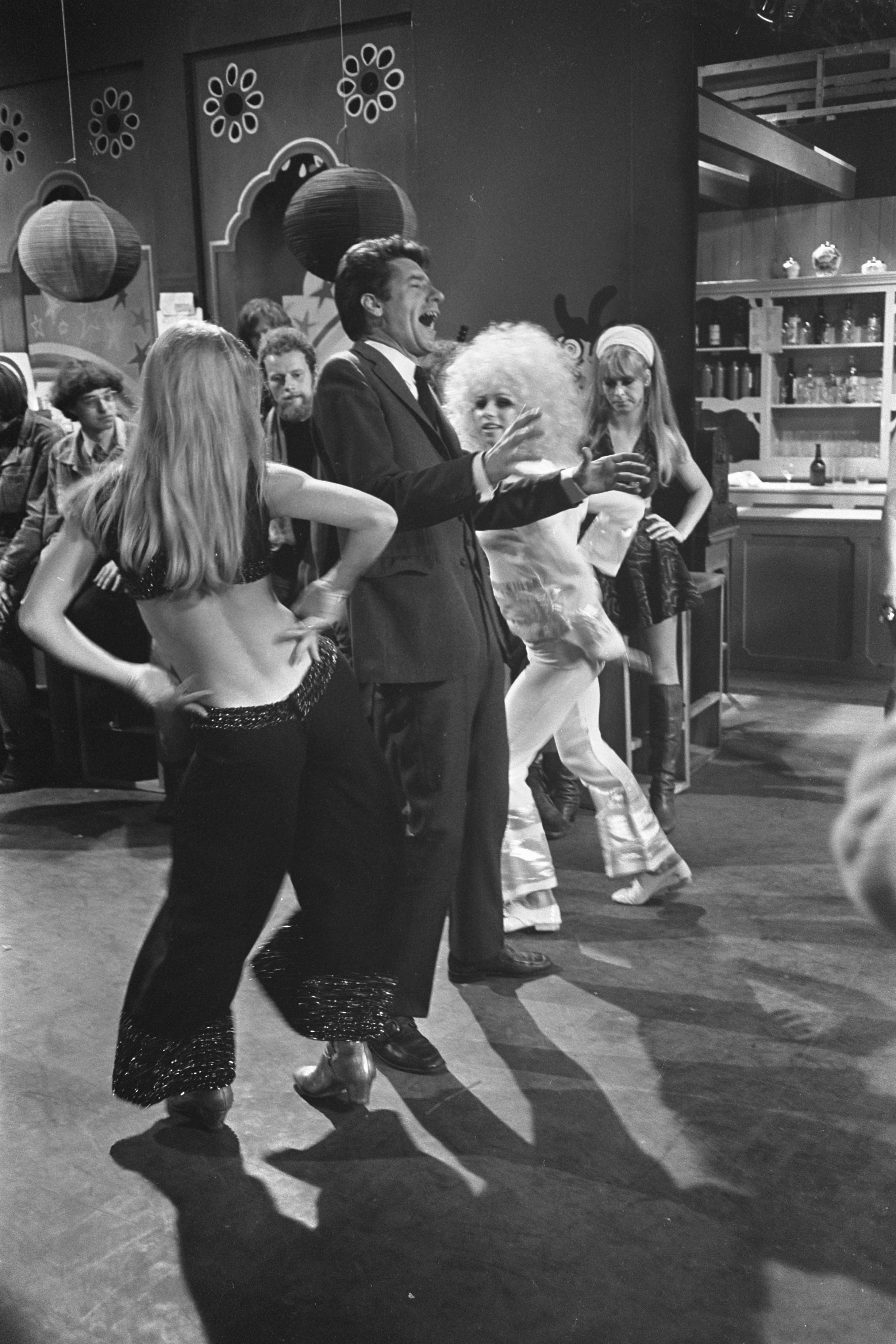 Collectie / Archief : Fotocollectie Anefo Reportage / Serie : Diana Dors in de Rudi Carrell show Beschrijving : Rudi Carrell met showgirls Annotatie : Rudi Carrell (1934-2006). Persoon in wit zou danseres Penny de Jager kunnen zijn Datum : 19 oktober 1968 Locatie : Hilversum Trefwoorden : artiesten, televisieprogramma's Persoonsnaam : Carrell, Rudi Fotograaf : Eric Koch / Anefo Auteursrechthebbende : Nationaal Archief Materiaalsoort : Negatief (zwart/wit) Nummer archiefinventaris : bekijk toegang 2.24.01.05 Bestanddeelnummer : 921-7795 Reacties Geplaatst door Maaike op 07 mei 2014 - 10:23. Scene in een disco NB. Uitgezonden op 2 november 1968 Geplaatst door Anoniem op 12 juli 2017 - 14:08. We werden als "hippy" aangeworven en onder contract geplaatst in Paradiso in Amsterdam om dansend op te treden in de Rudi Carrell show. Eerst een oefening in de studio in Hilversum, dan op 2 November 1968 live. Dat was dus vier keer heen en weer naar Hilversum met de dure trein. We mochten Rudi geen hand geven. Bang voor besmettelijke ziekten? Toen we de studio verlieten gaf ik hem een hand, hij glimlachte. Vervolgens werd de contracueel overeengekomen 45 Gulden door de TV niet uitbetaald.